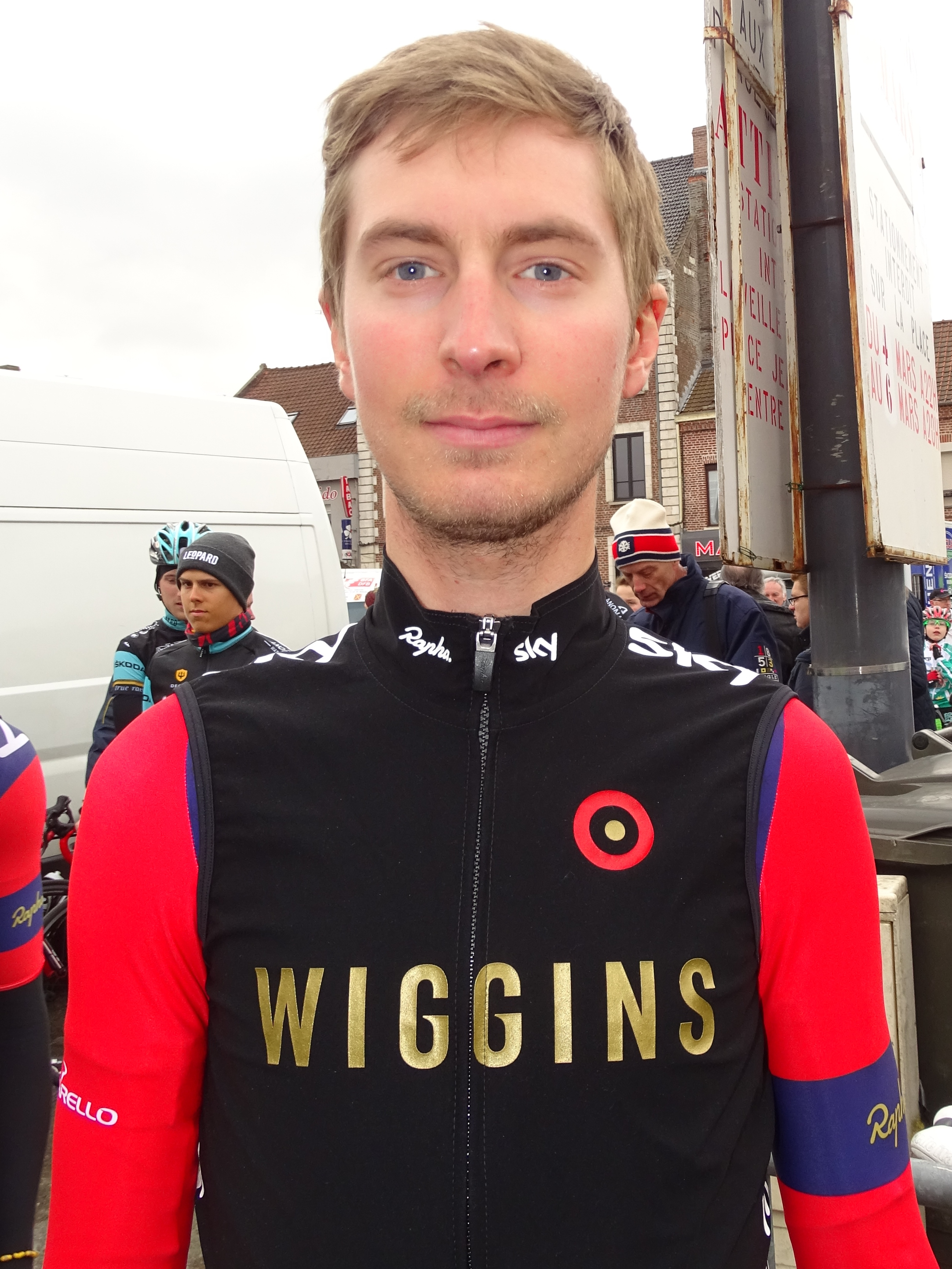 Reportage réalisé le dimanche 6 mars à l'occasion du départ et de l'arrivée du Grand Prix de Lillers-Souvenir Bruno Comini 2016 à Lillers, Pas-de-Calais, Nord-Pas-de-Calais, France.